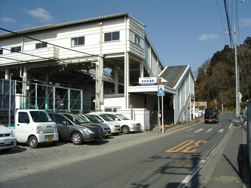 京成電鉄本線宗吾参道駅